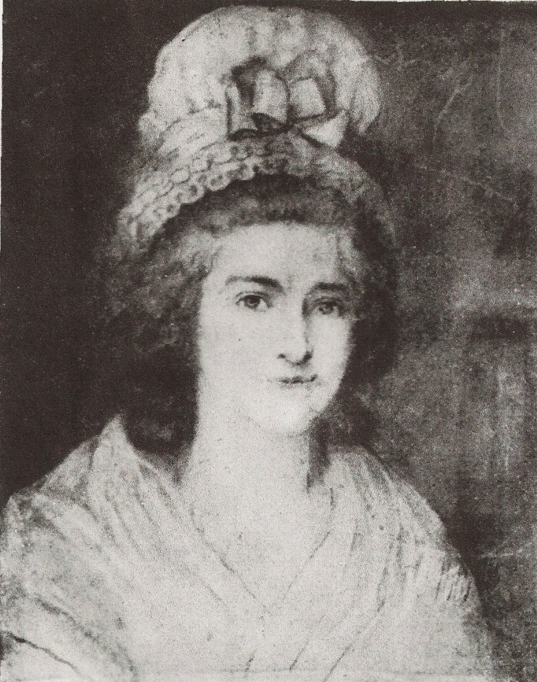 Portrait d'Euphrasie Conen de Saint-Luc à la prison de Carhaix (par Victoire Conen de Saint-Luc)